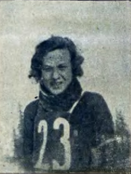 Doreen Elliott podczas Mistrzostw Świata w Narciarstwie Klasycznym 1929